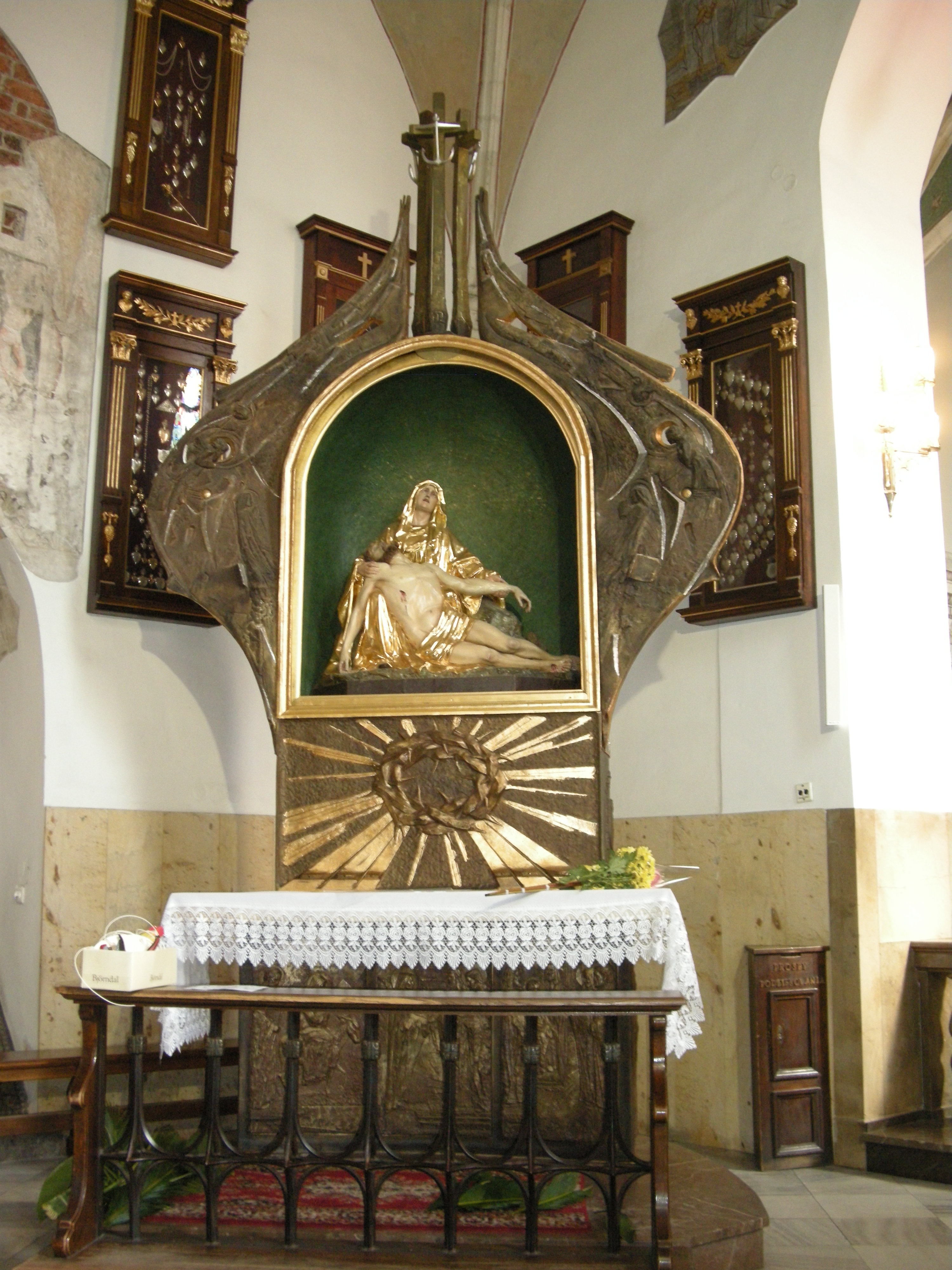 Ołtarz z 1986 r. z Pietą z początku XVII w.